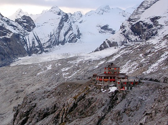 Passo dello Stelvio, Augustus 2005